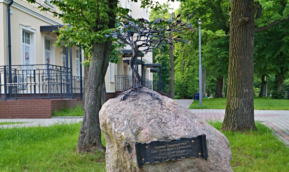 Дерево Творчества